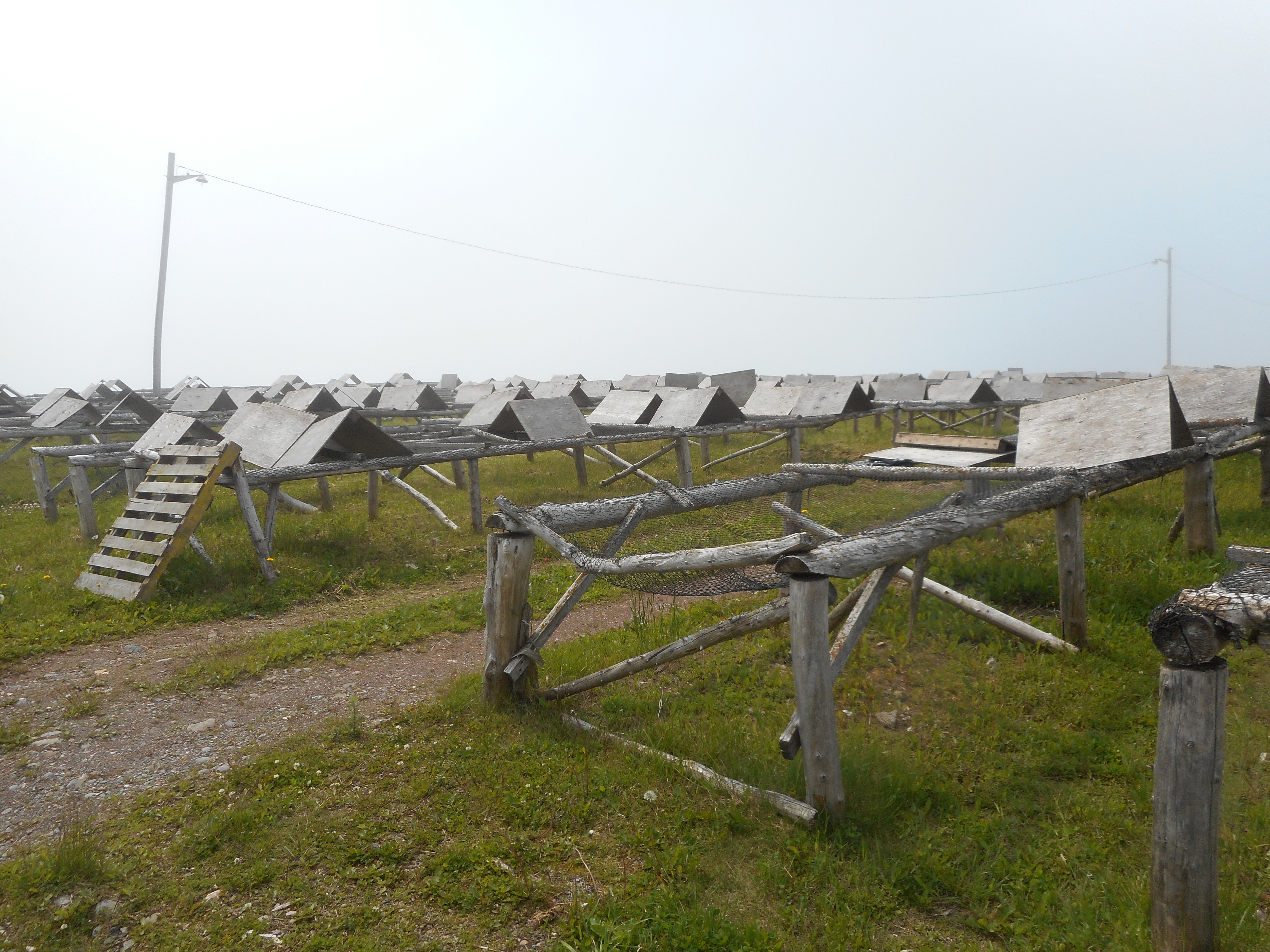 Lelièvre, Lelièvre et Lemoignan - Économusée du salage et du séchage du poisson, 52, rue des Vigneaux, Sainte-Thérèse-de-Gaspé, Québec